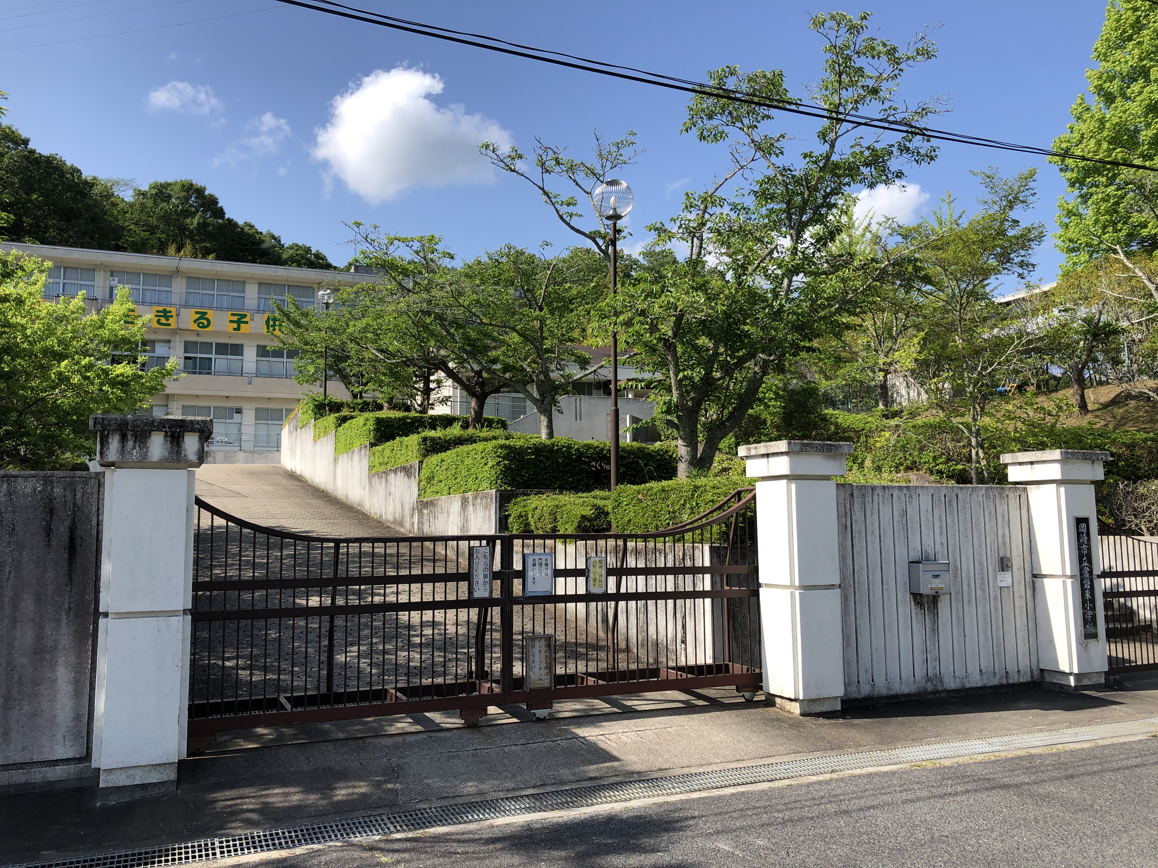 岡崎市立常磐東小学校（岡崎市米河内町）